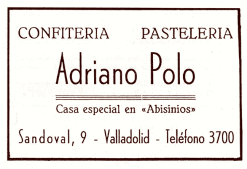 Cartel de la confitería Adriano Polo